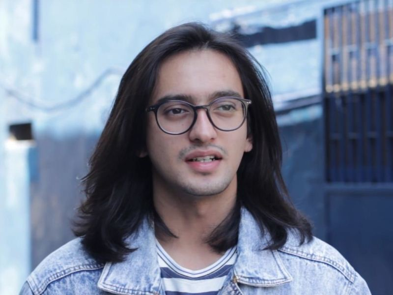 Omar Daniel di Gogirl! TV